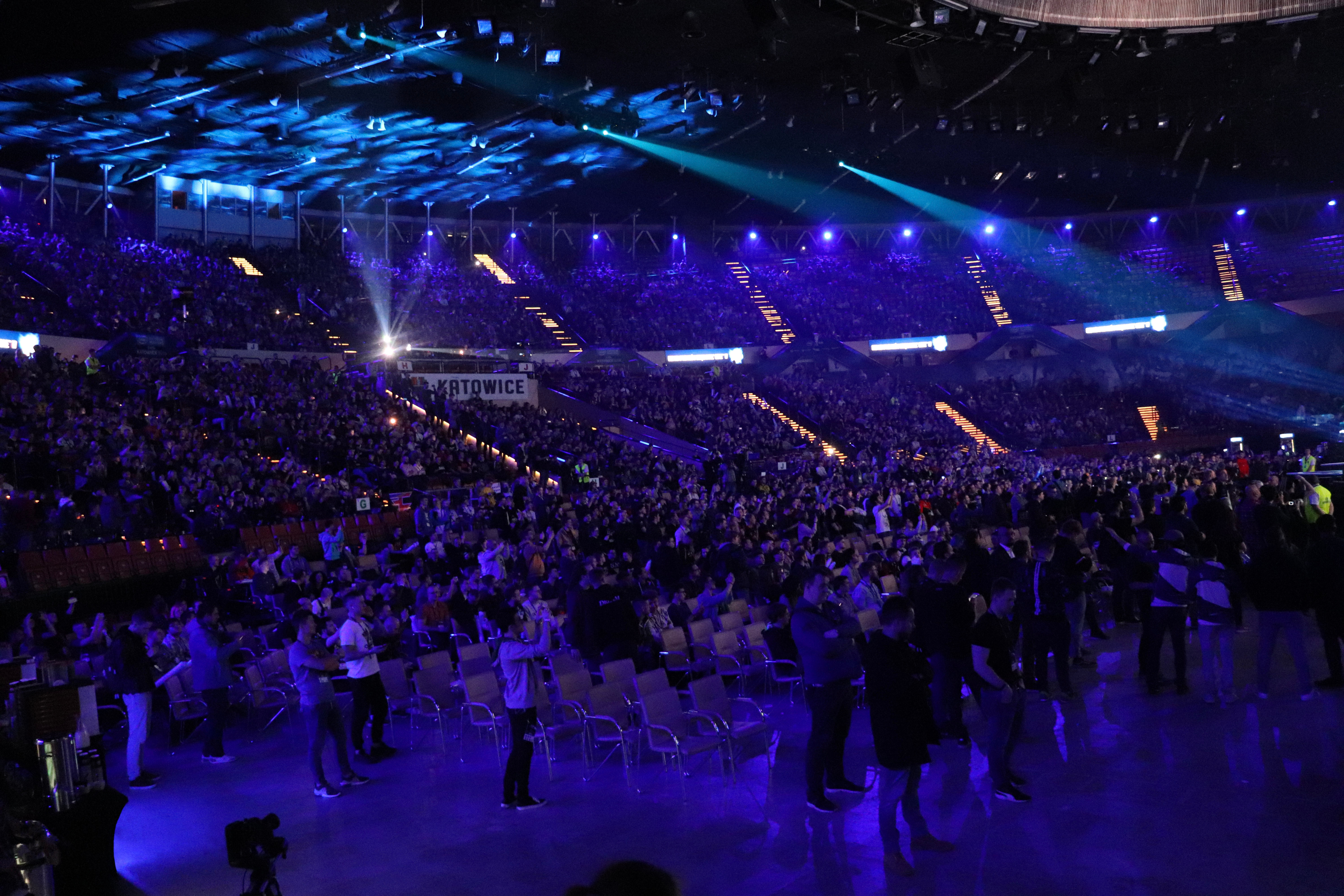 Зал зрителей IEM Katowice Major 2019